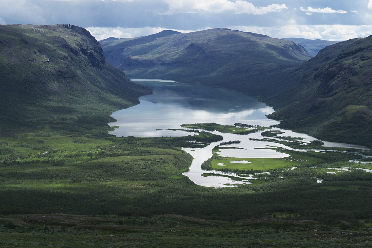 Rautasjaure, nordsamiska Rávttasjávri, är en fjällsjö söder om Torne träsk i Kiruna kommun i Lappland.